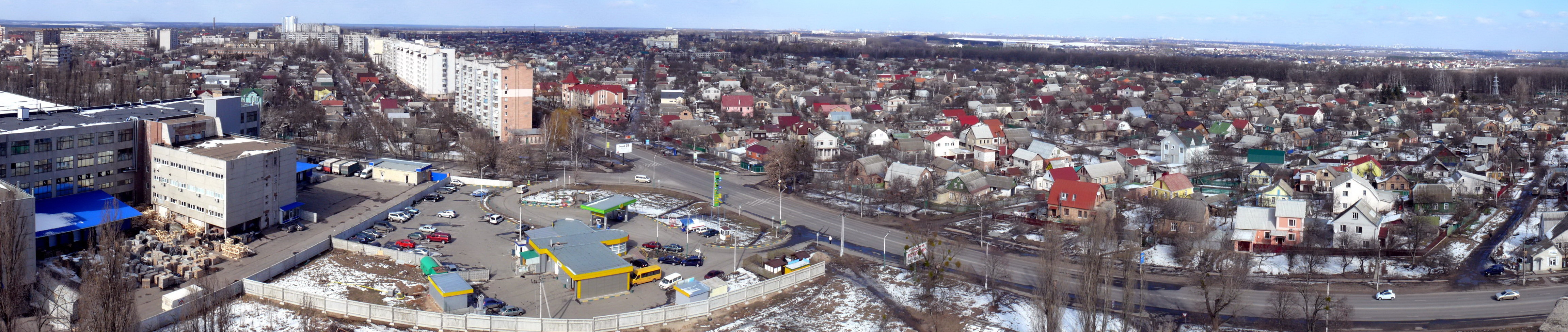 Зимова Боярка